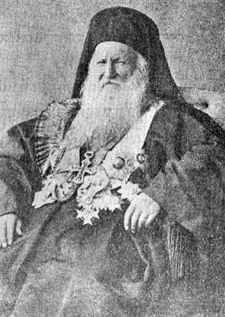 Патриарх Иерусалимский Кирилл II